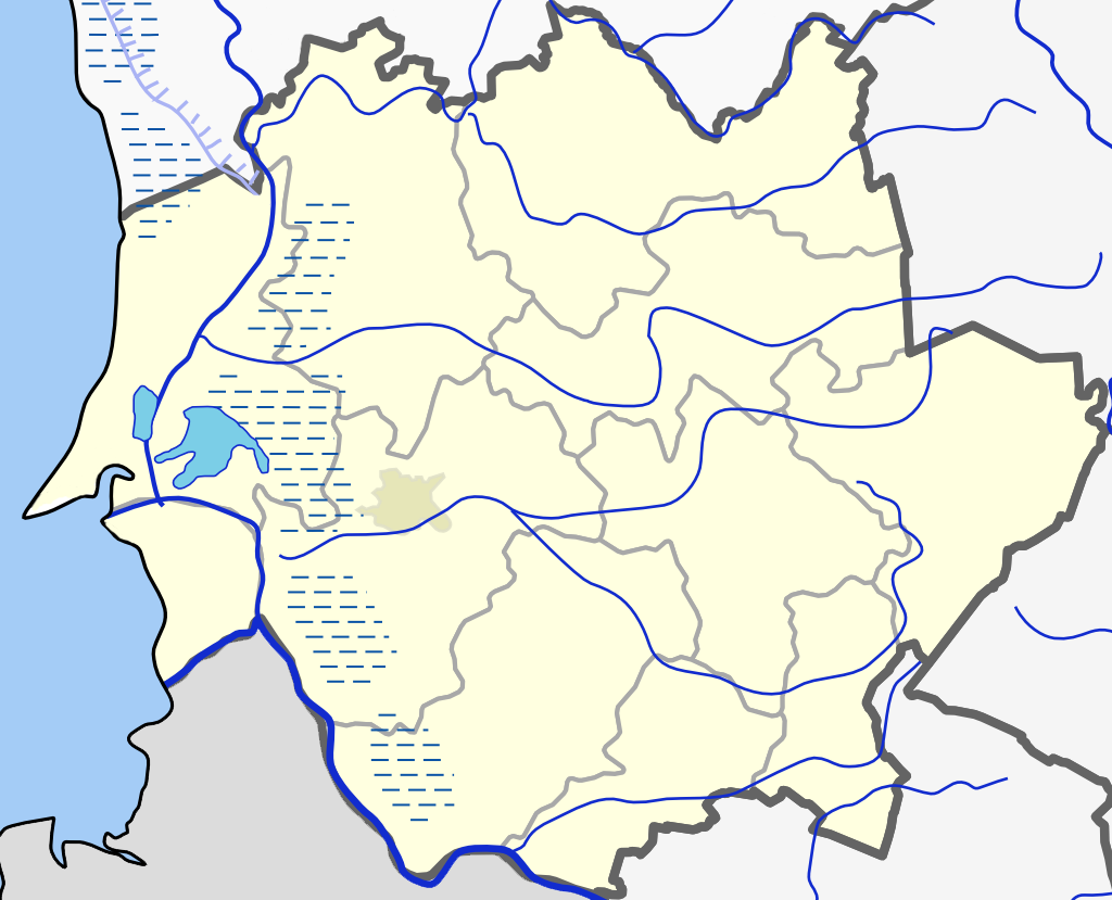 Šilutės rajono žemėlapis.